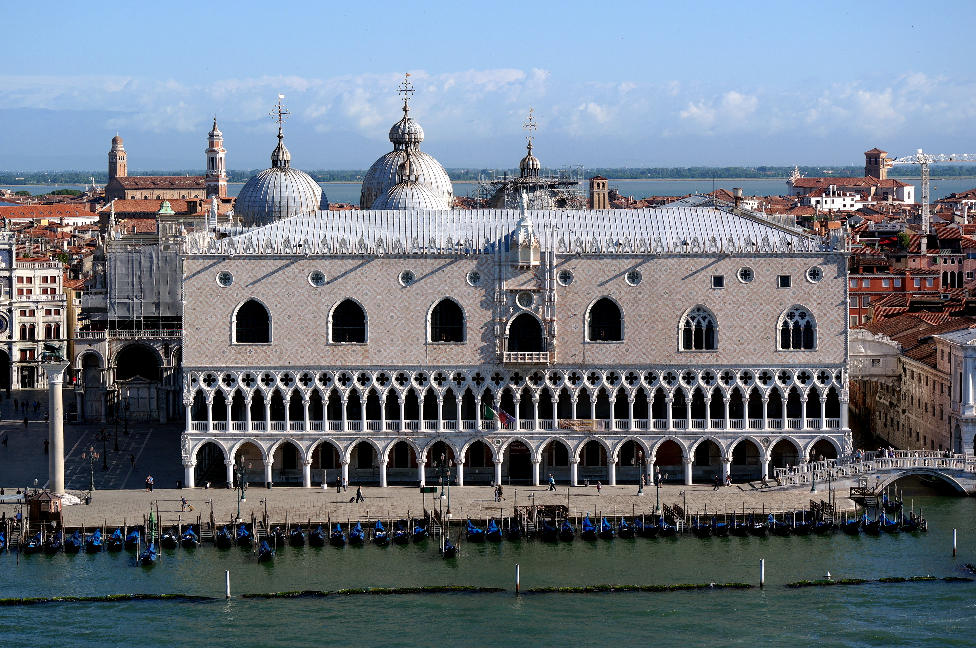 Veduta di Palazzo Ducale a Venezia